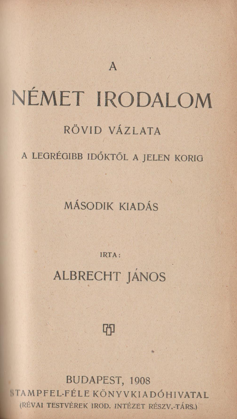 Az adott mű címlapját.